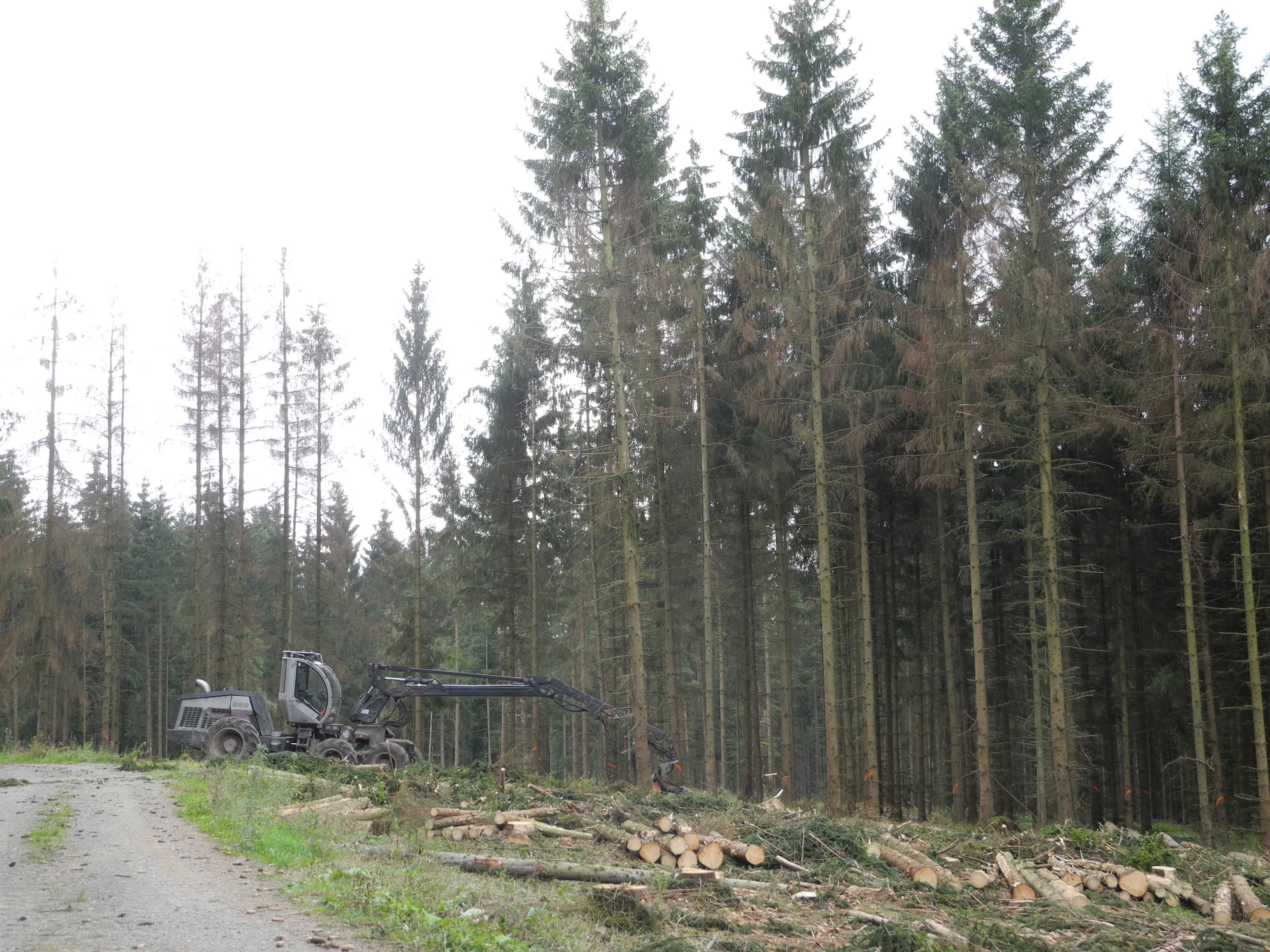 Geschädigte und tote Fichten am Klauskopf, Gemeinden Bad Emstal/Naumburg, Hessen, Deutschland. Lage: ca. 600 m nordwestlich des Gipfels des Klauskopf - am Rundweg 2